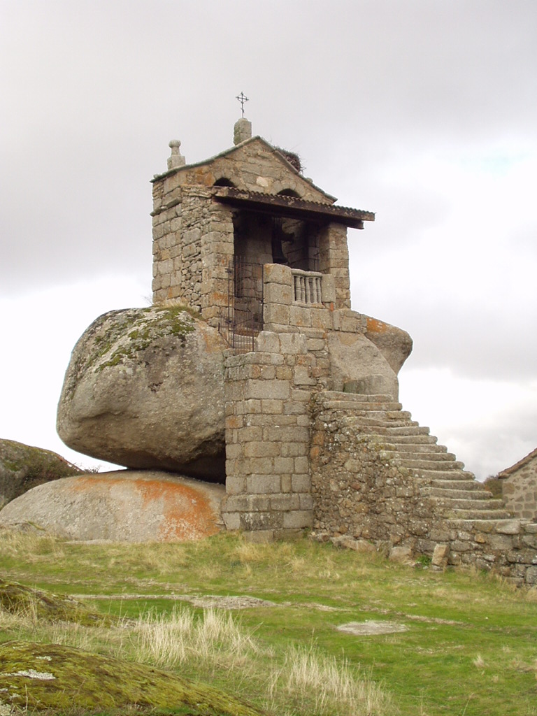 Torre de la iglesia, en Neila de San Miguel, municipio de Ávila, España.